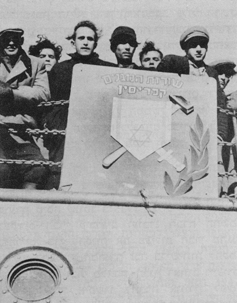 סמל שורות המגינים בקפריסין 1948 ארכיון ההגנה